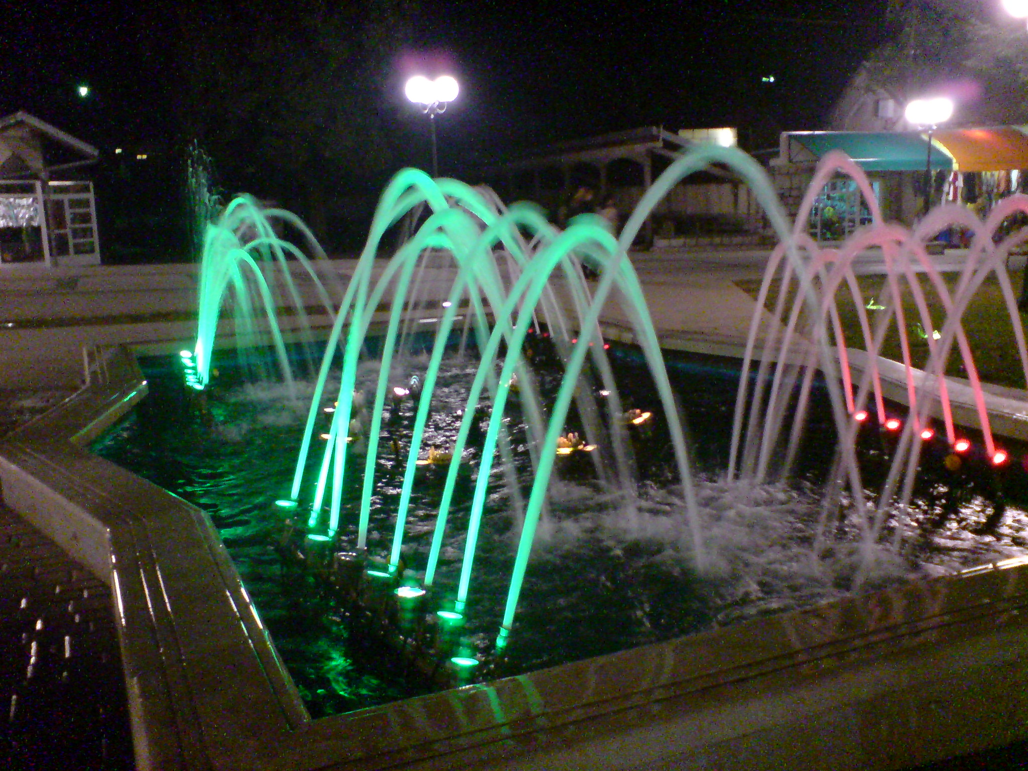 Фонтана код градске пијаце